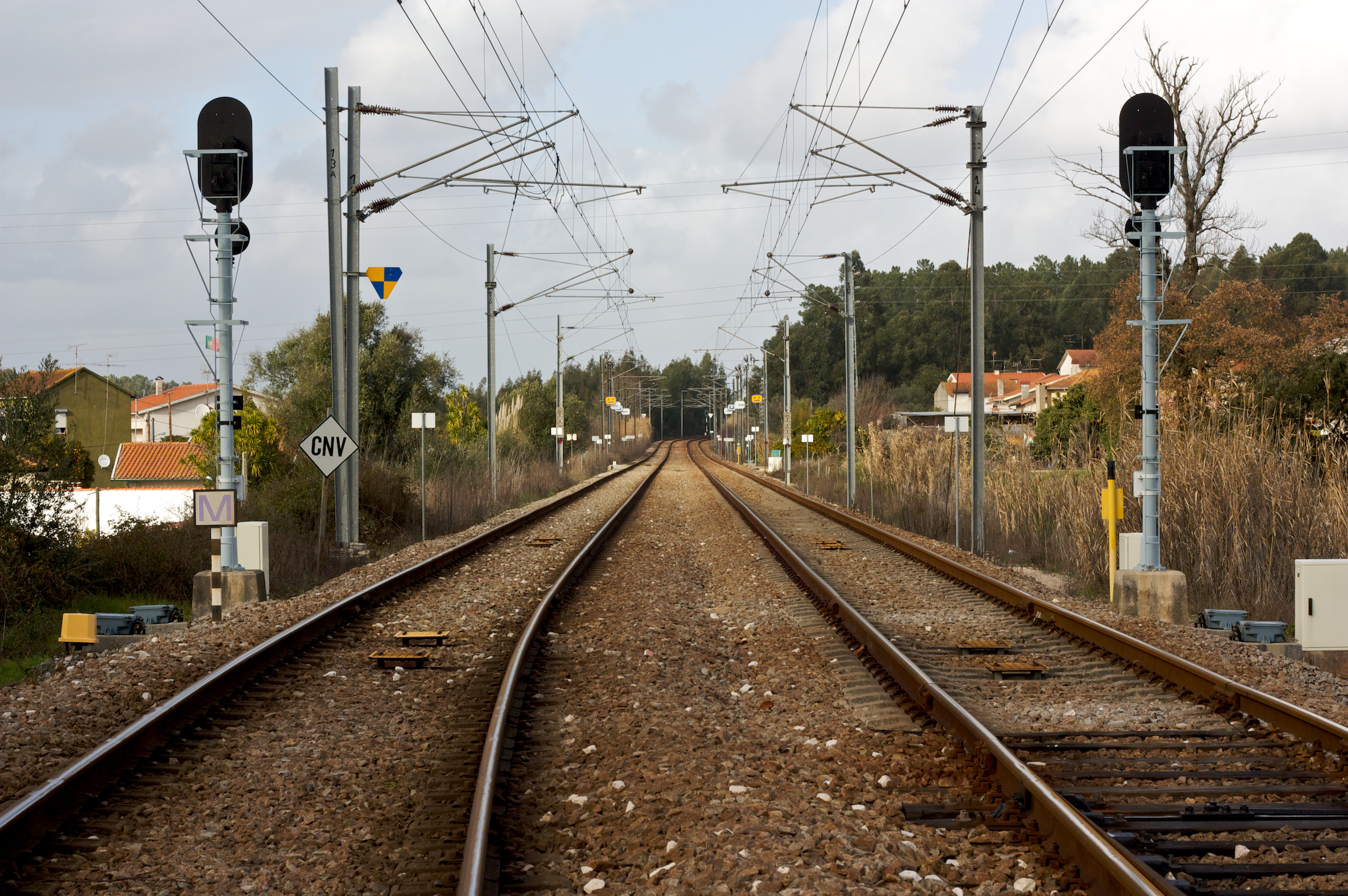 Via férrea: Linha da Beira Alta [PK 51] Local: Pampilhosa Data e hora: 24 de Janeiro de 2009 [14h53] Sentido: Vilar Formoso apesar do Ponto Quilométrico, é o actual início da LBA.